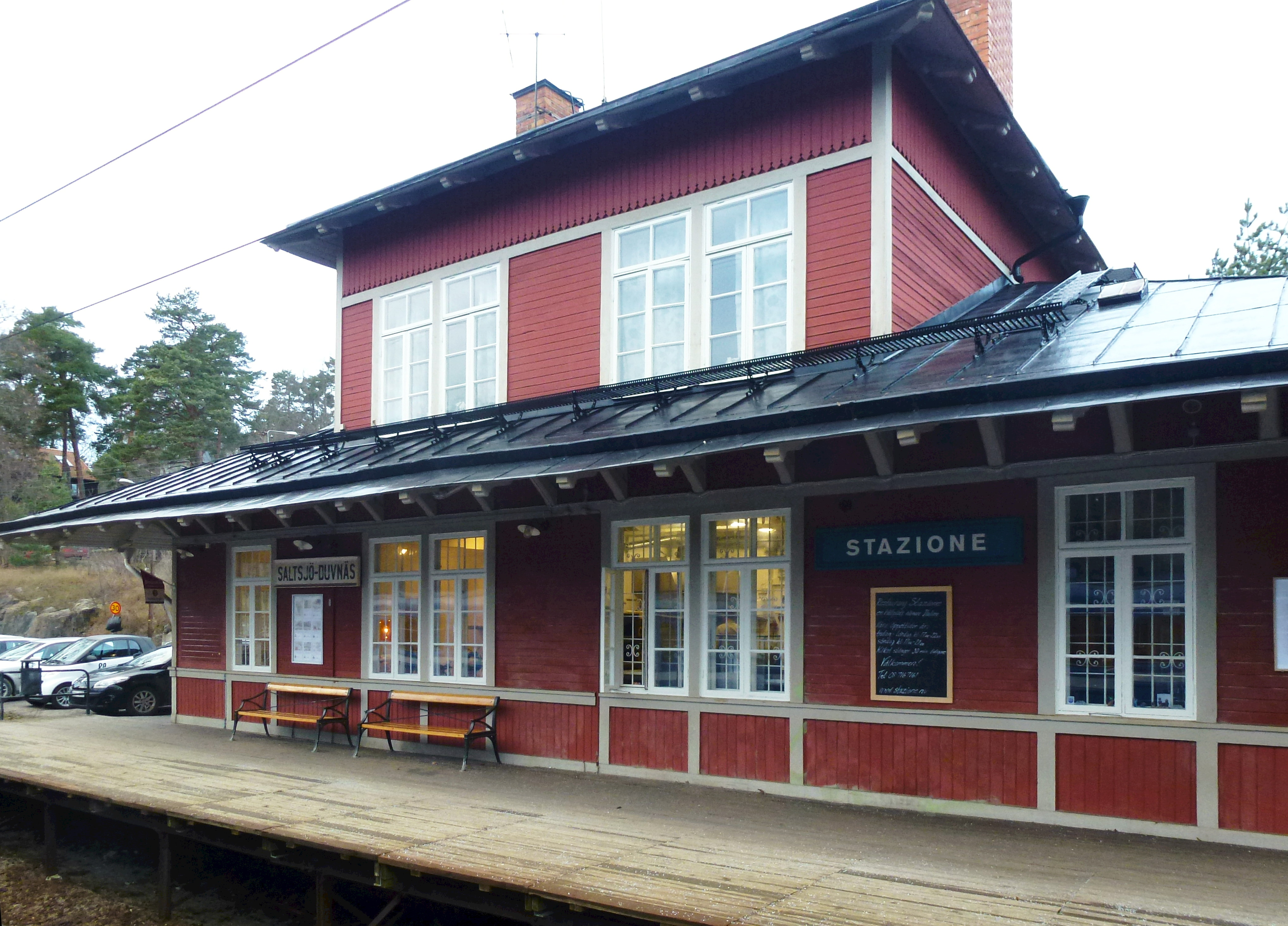 Saltsjöbanan, stationshuset i Saltsjö-Duvnäs